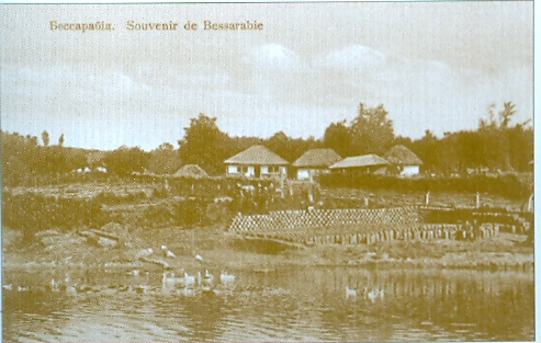 Бесарабия. Пощенска картичка от началото на ХХ век. Издание на А. Волкенберг, Кишинев.